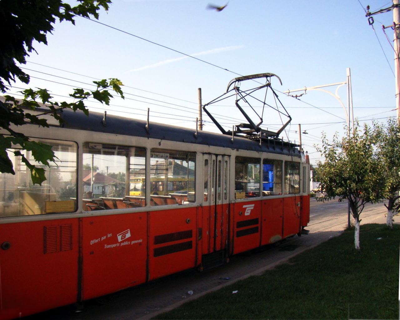 Hermannstadt, Straßenbahn nach Städterdorf-Rășinari an der Endhaltestelle vor dem Friedhof.